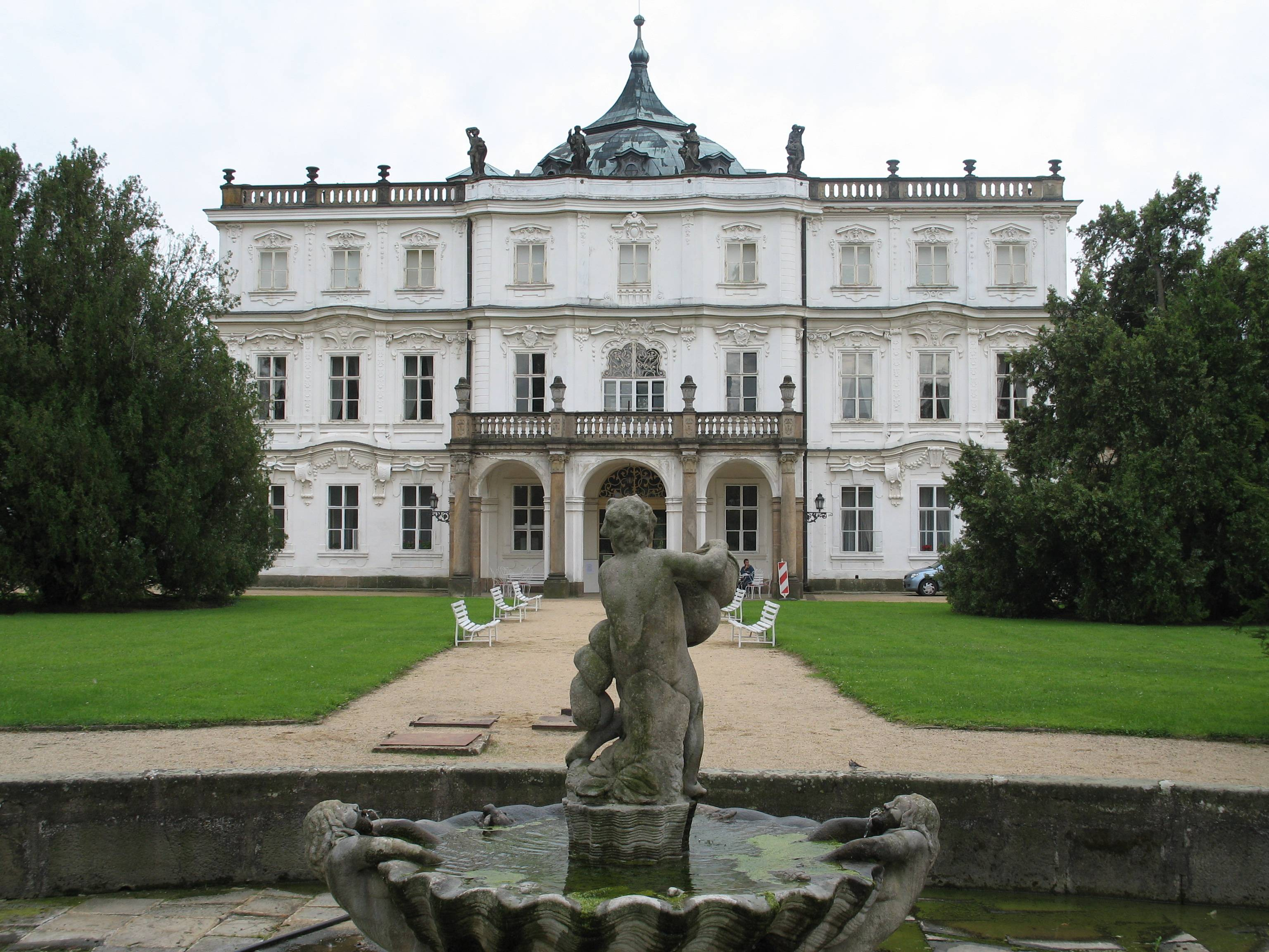 Castle Ploskovice